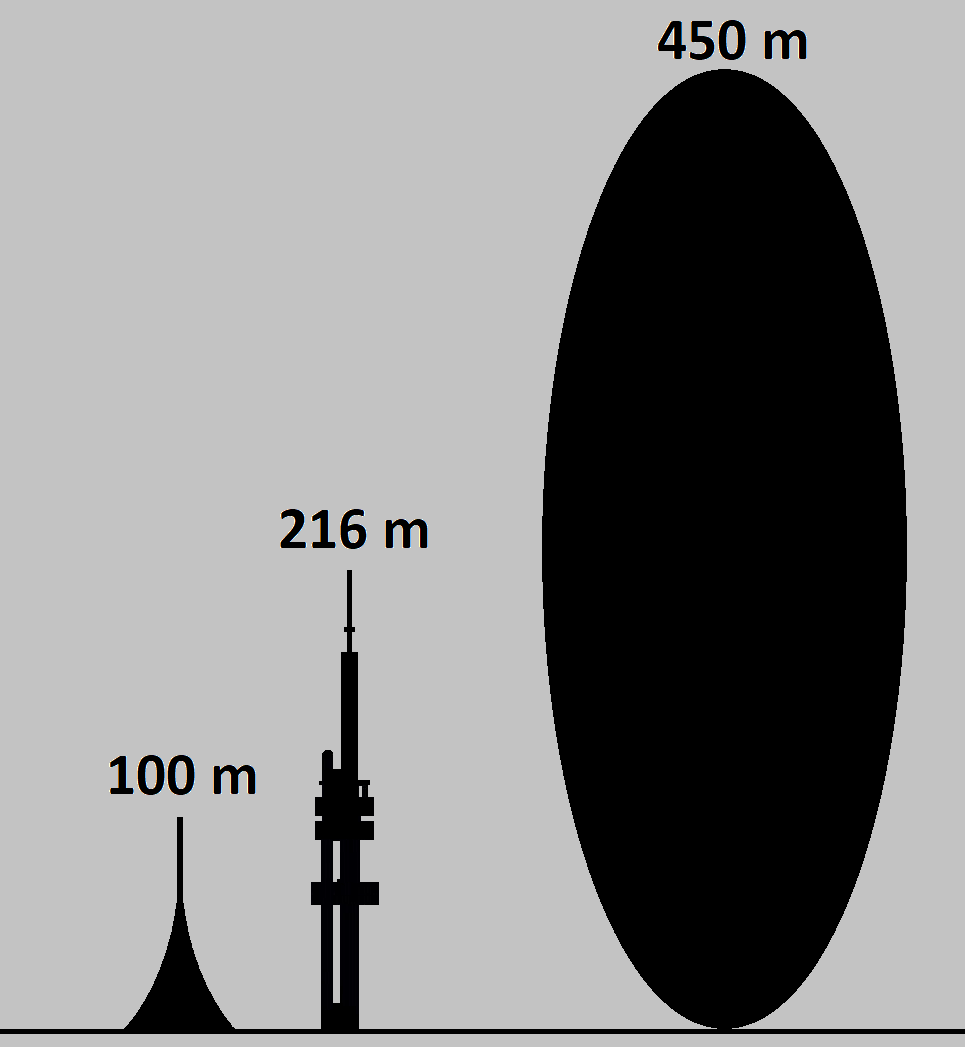 Planetka Apophis v porovnání s vysílačem na Ještědu a Žižkovskou věží. Šířka vesmírného tělesa je jen cca 170 m.